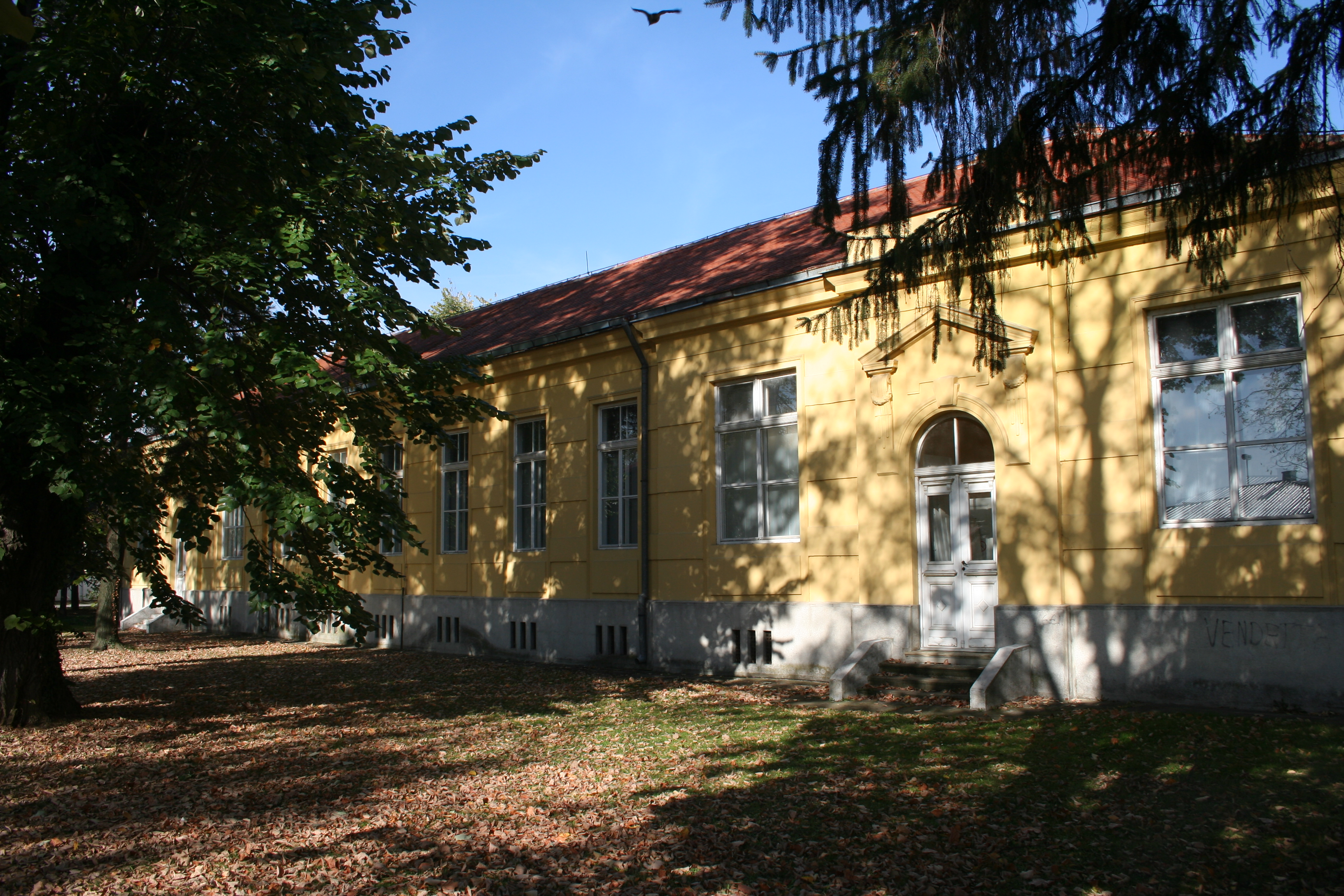 Zgrada ratne bolnice Valjevo